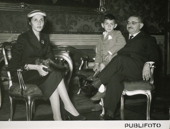 Giovanni Leone con la moglie ed il figlio e con alcune persone dopo l'elezione a presidente della Camera dei Deputati